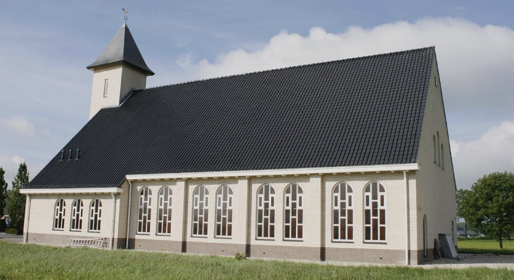 Kerkje Filadelfiagemeente Culemborg